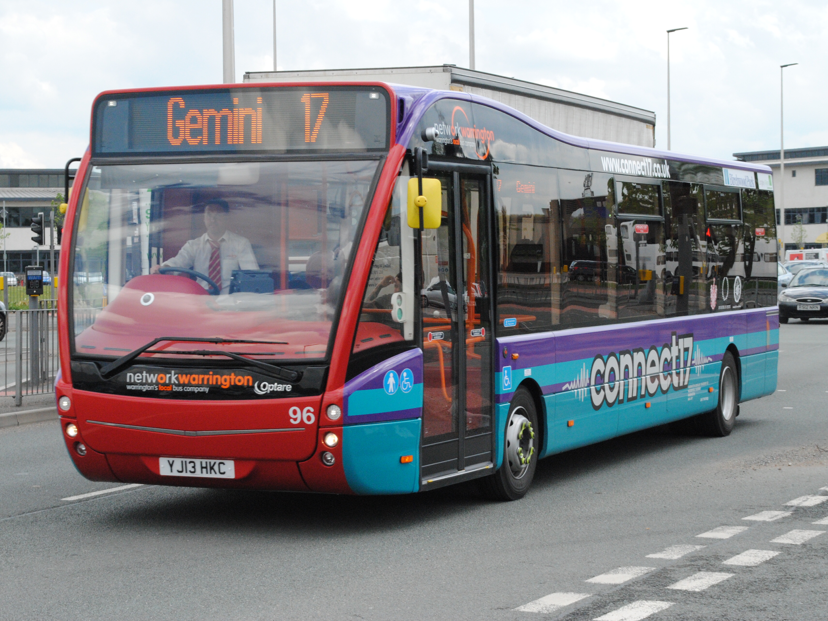 Optare Versa V1100